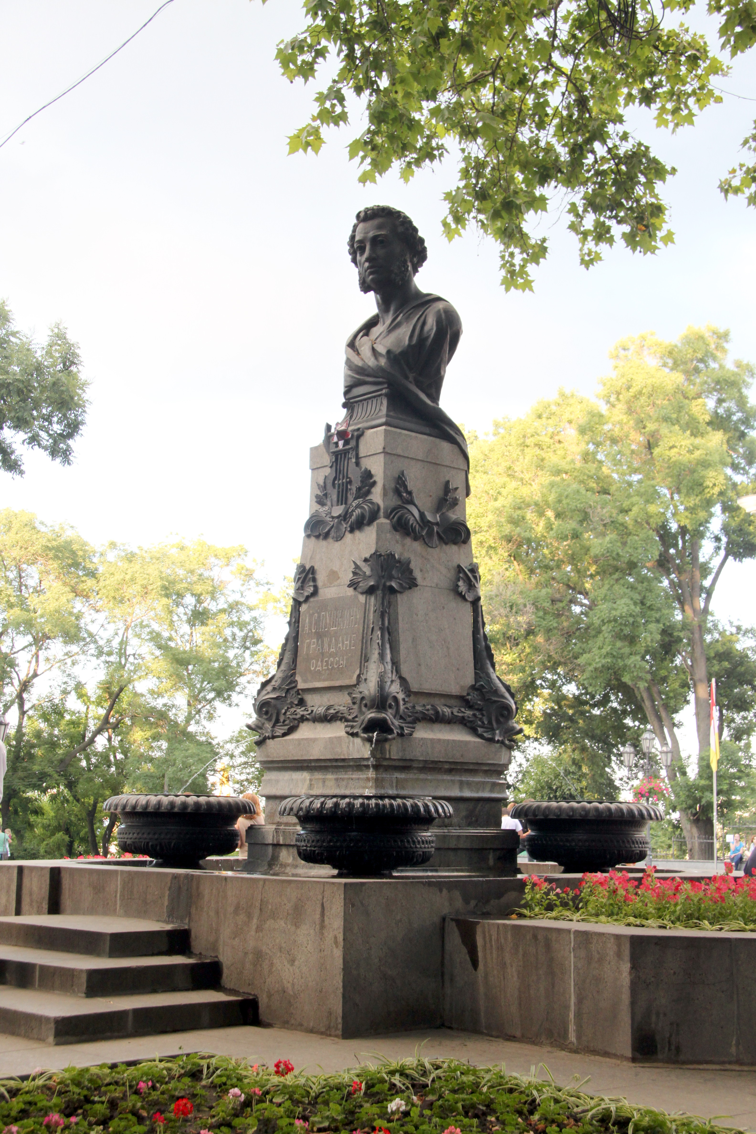 Пам'ятник поету О.С. Пушкіну, Приморський бул., Одеса